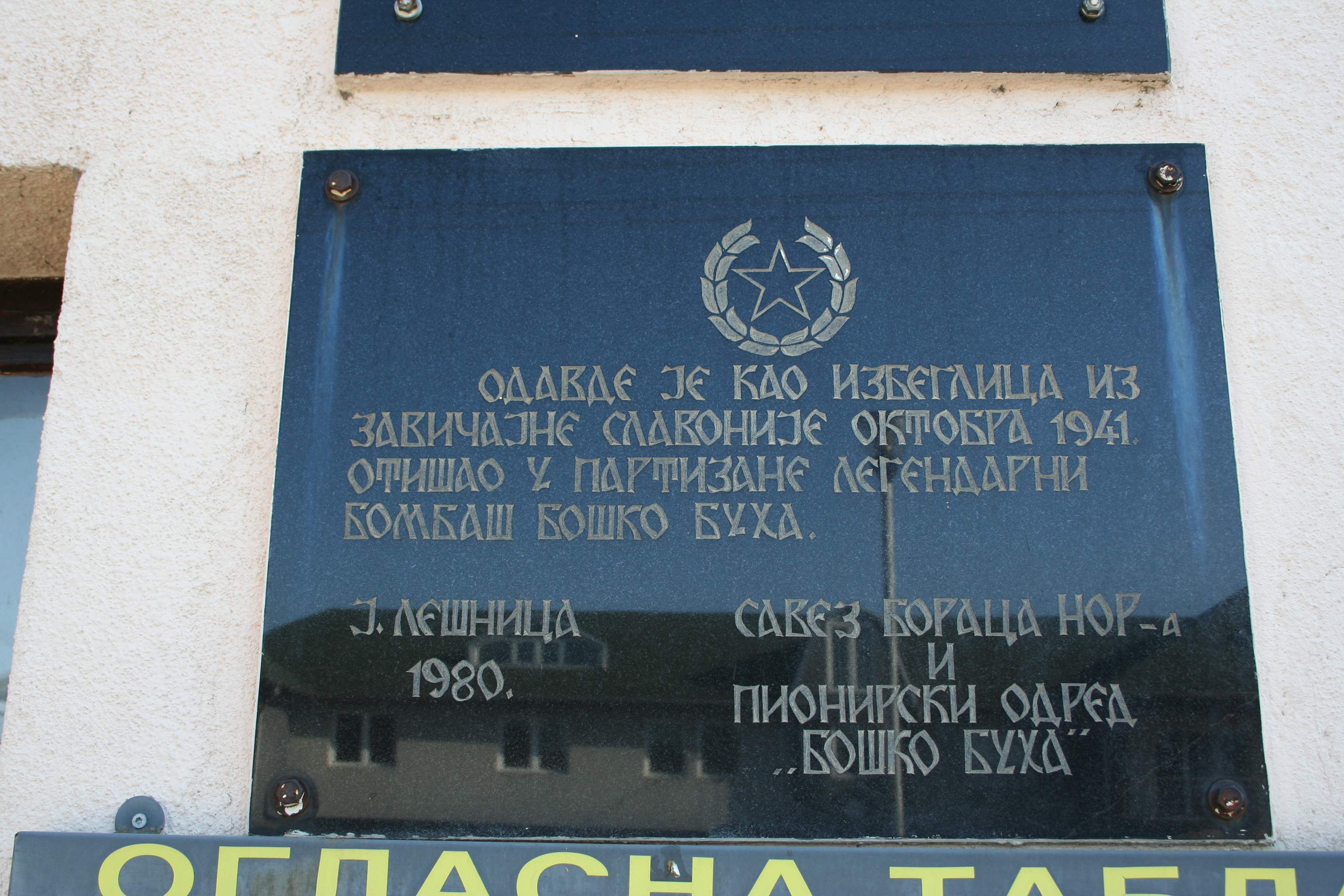 Spomen ploča na zgradi MZ, Jadranska Lešnica